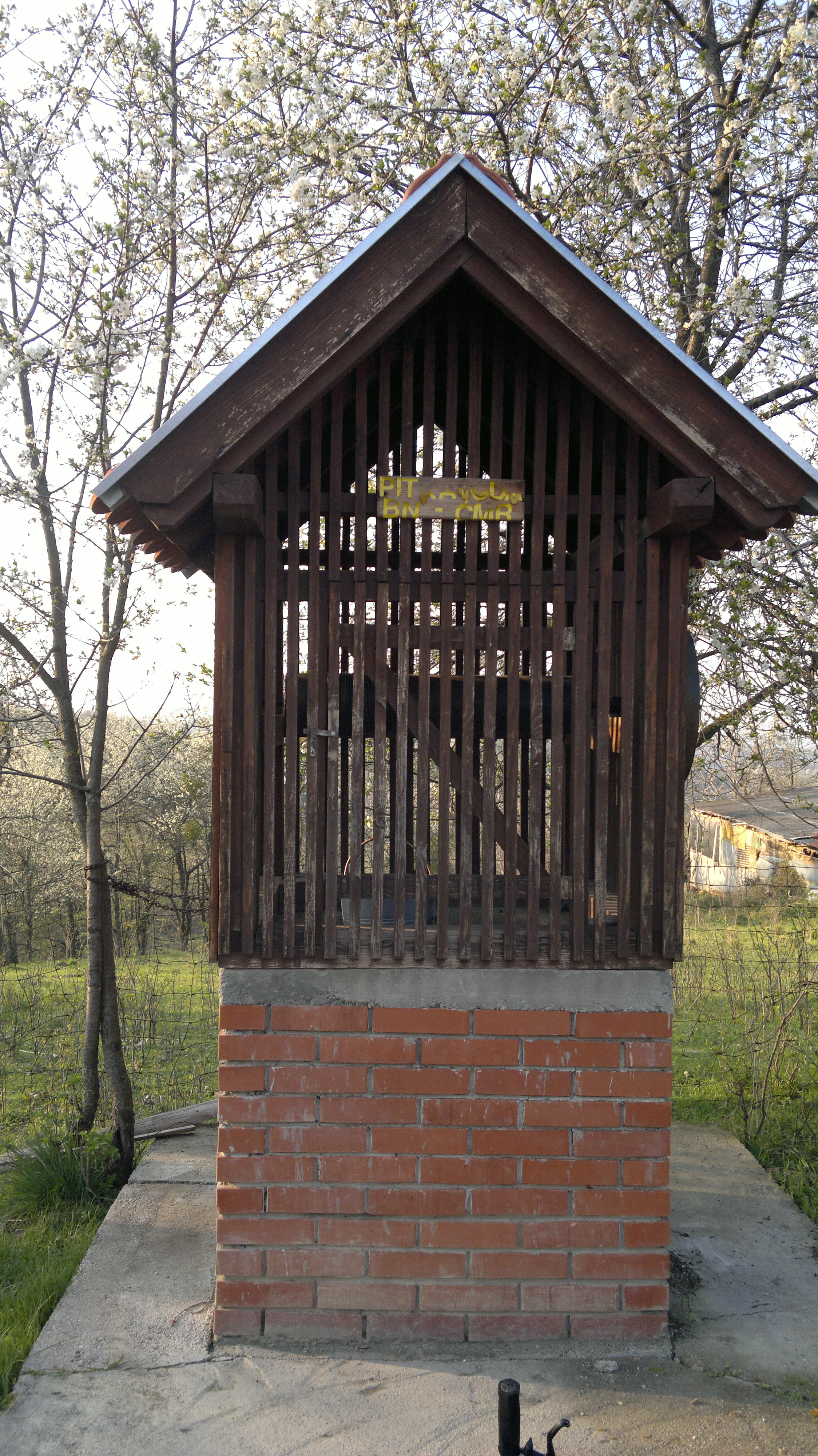 34000, Ćosine Laze, Croatia